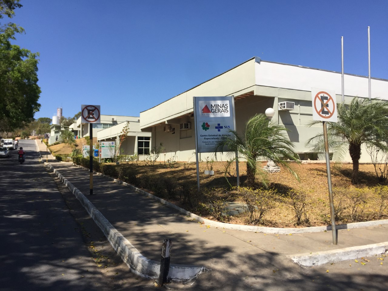 Unidade de atenção secundária no Município de Santo Antônio do Monte